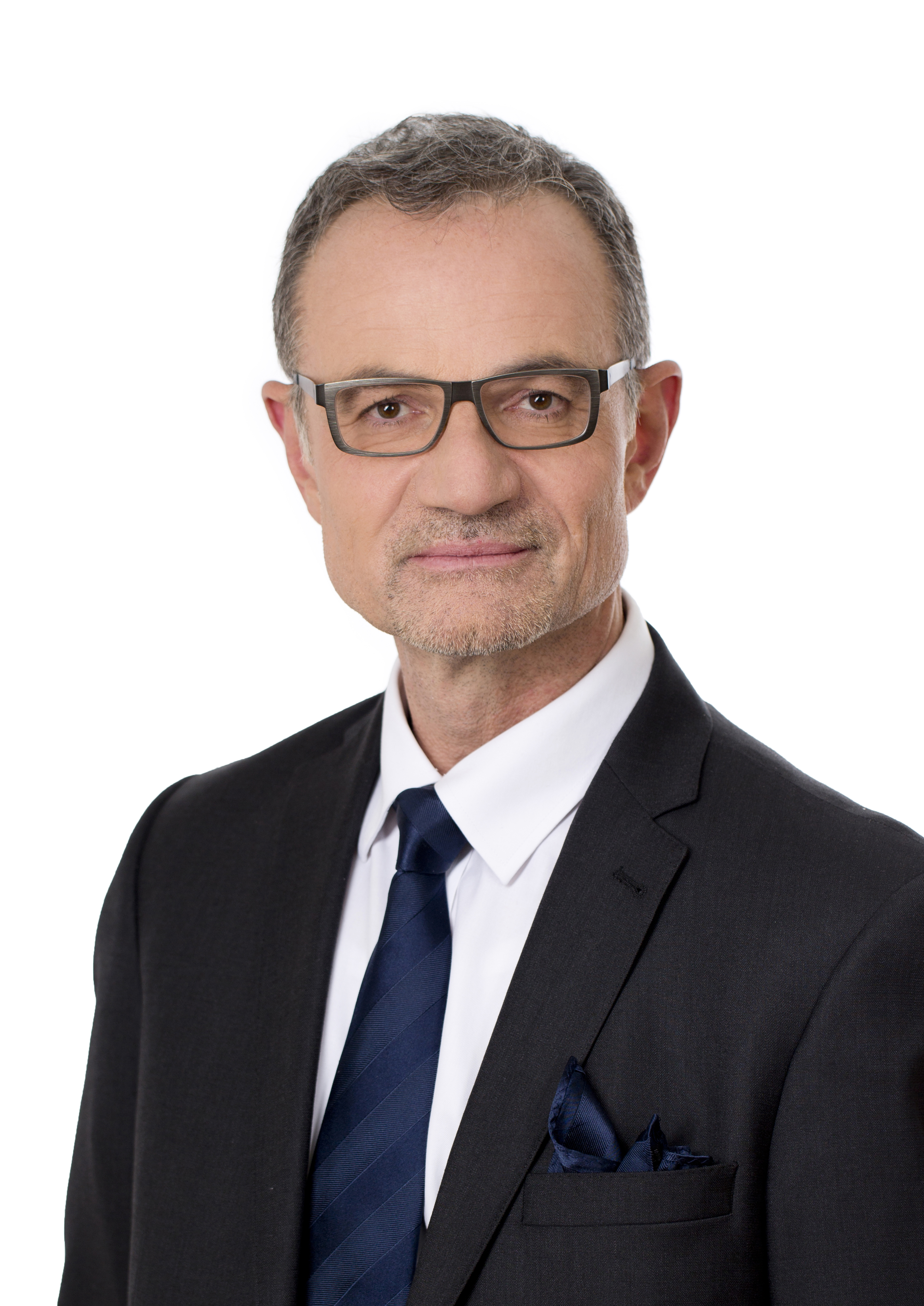 (c)FelicitasMatern